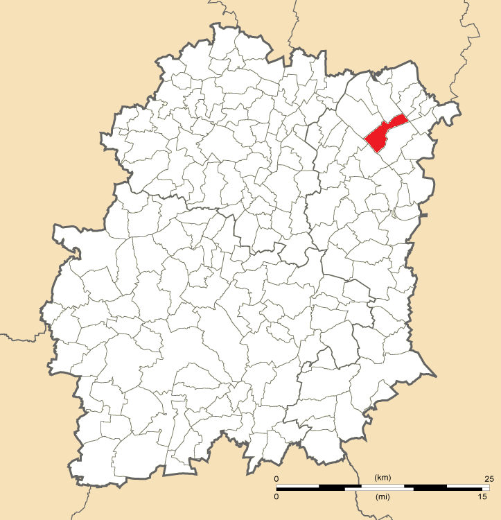 Carte de position de Soisy-sur-Seine en Essonne (91)